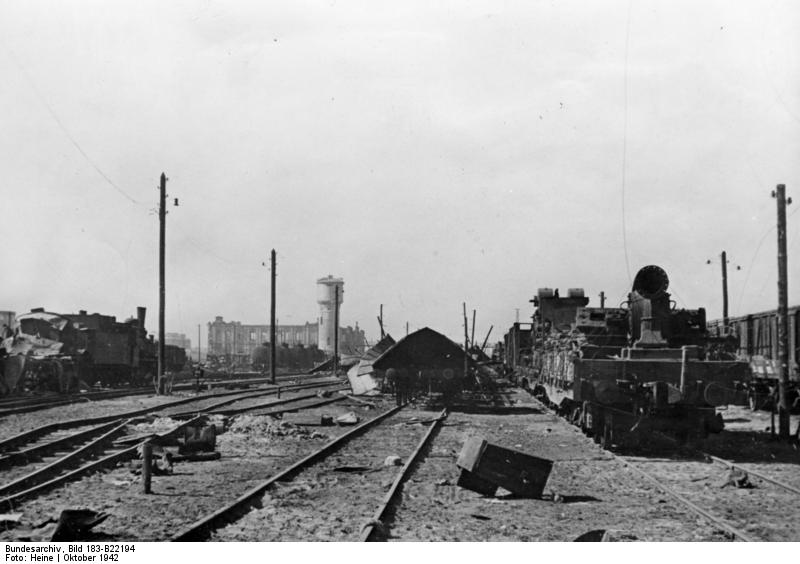 Russland, Kampf um Stalingrad, Bahnanlage Im eroberten Bahnhof von Stalingrad Vielfach zeigen die Bahnanlagen Spuren erbitterter Kämpfe. PK-Aufnahme: Kriegsberichter Heine 22.10.42 [Herausgabedatum] [Sowjetunion.- Schlacht um Stalingrad]